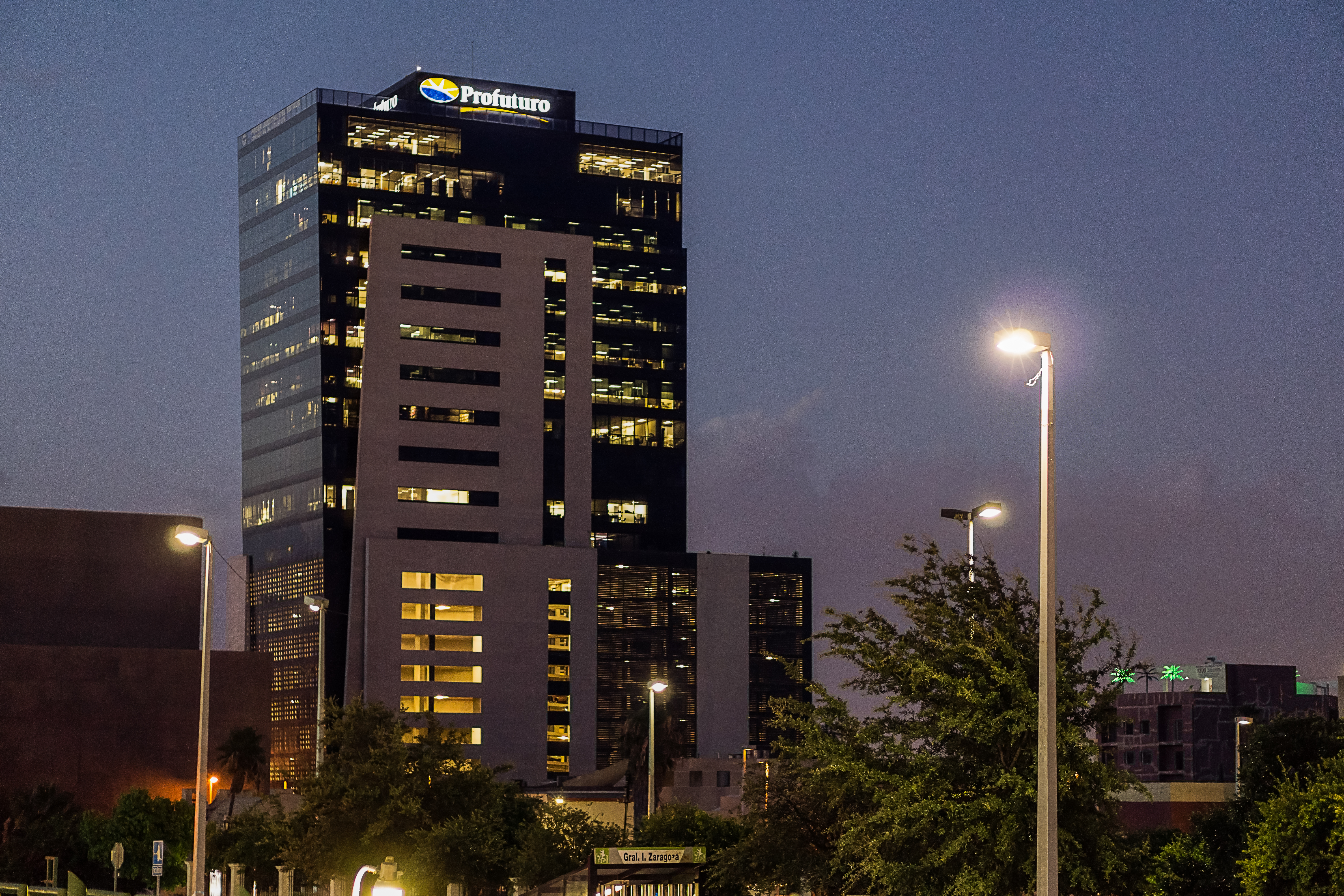 Hotel en el centro de Monterrey.